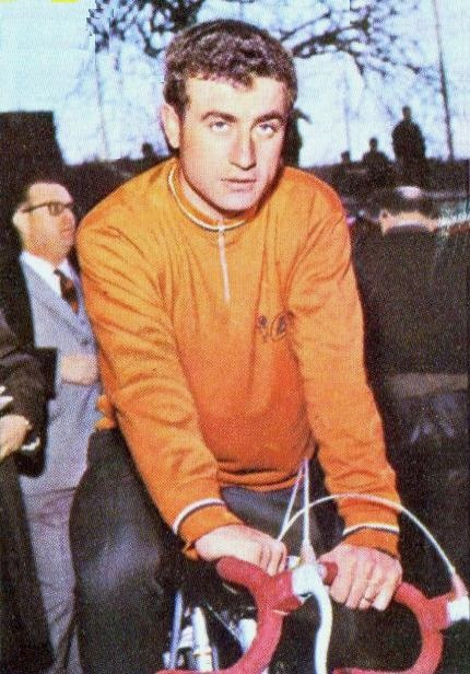 Lucien Aimar en 1969 - PANINI Campioni dello Sport 1969/1970, n°196